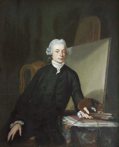 Portrait of Jan van Os